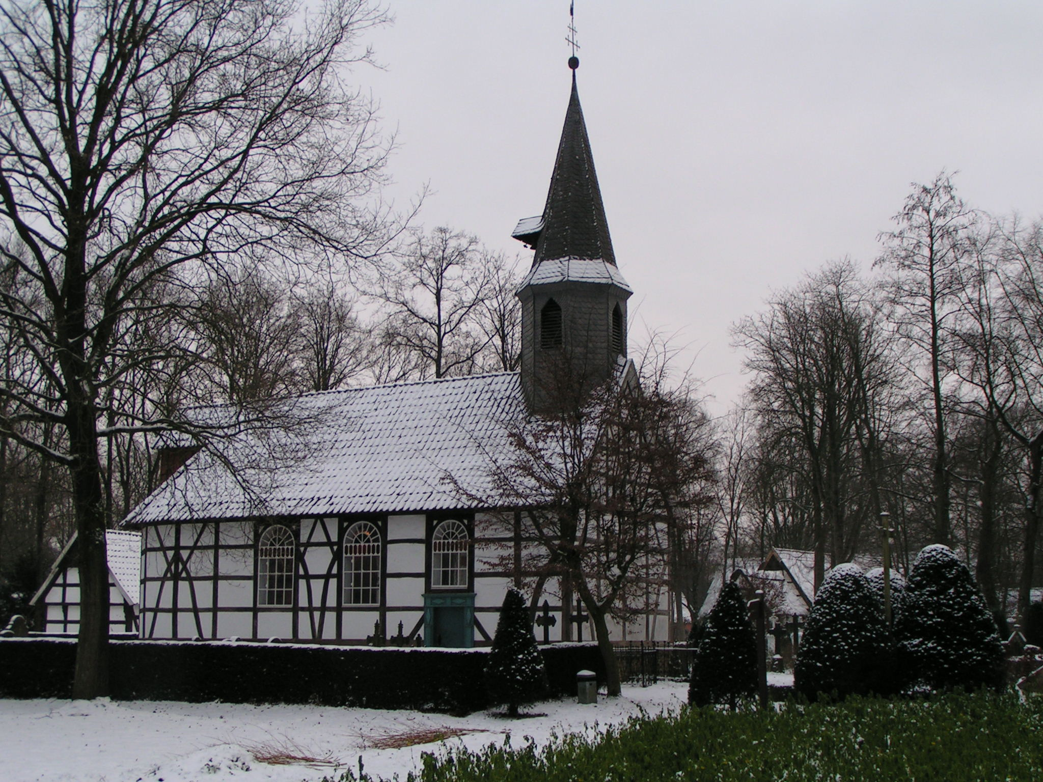 Fachwerkkirche aus Klein-Escherde im Museumsdorf Cloppenburg (erbaut 1698)